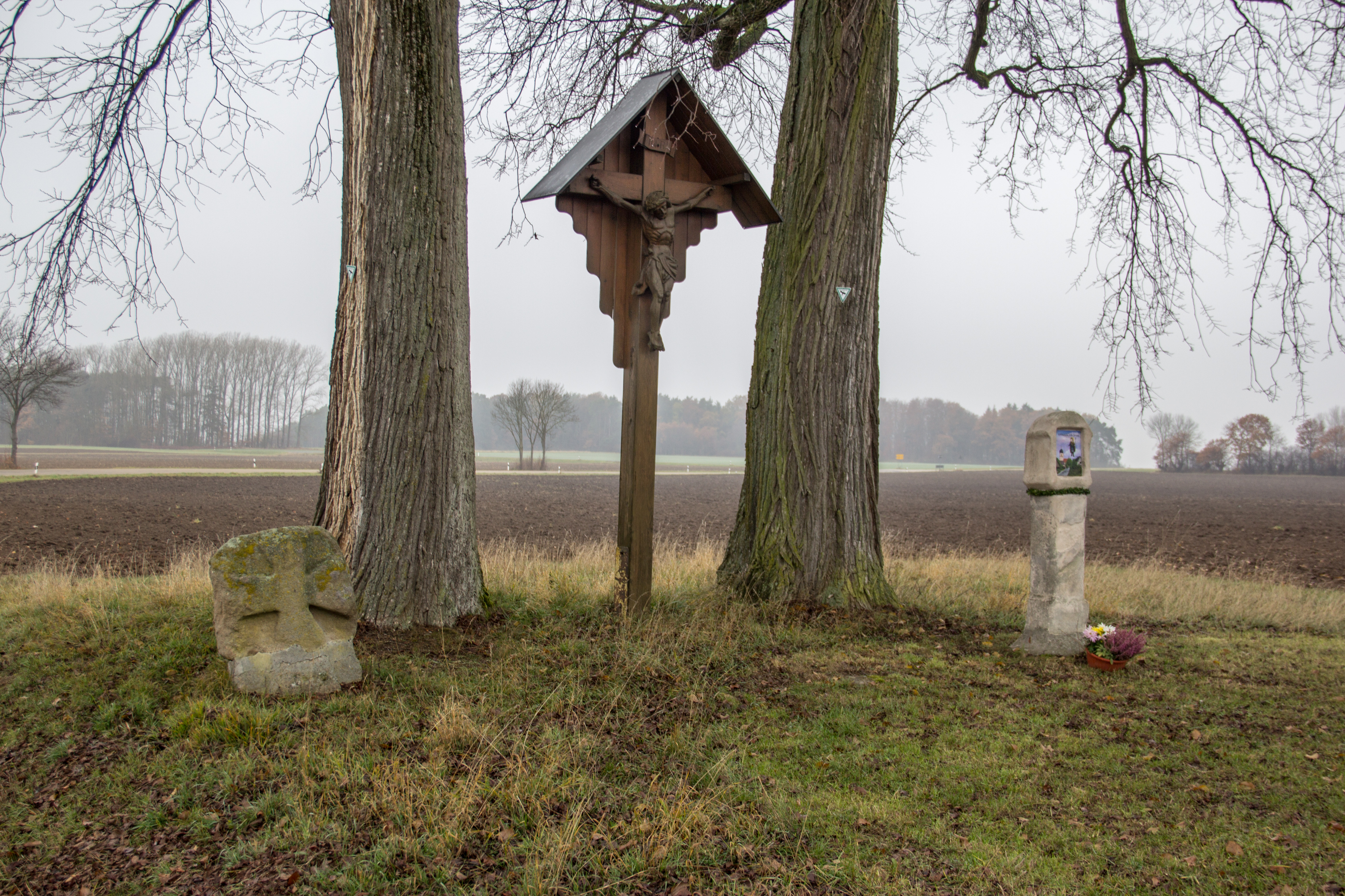 Steinkreuz,Sandstein, bei Jahrsdorf